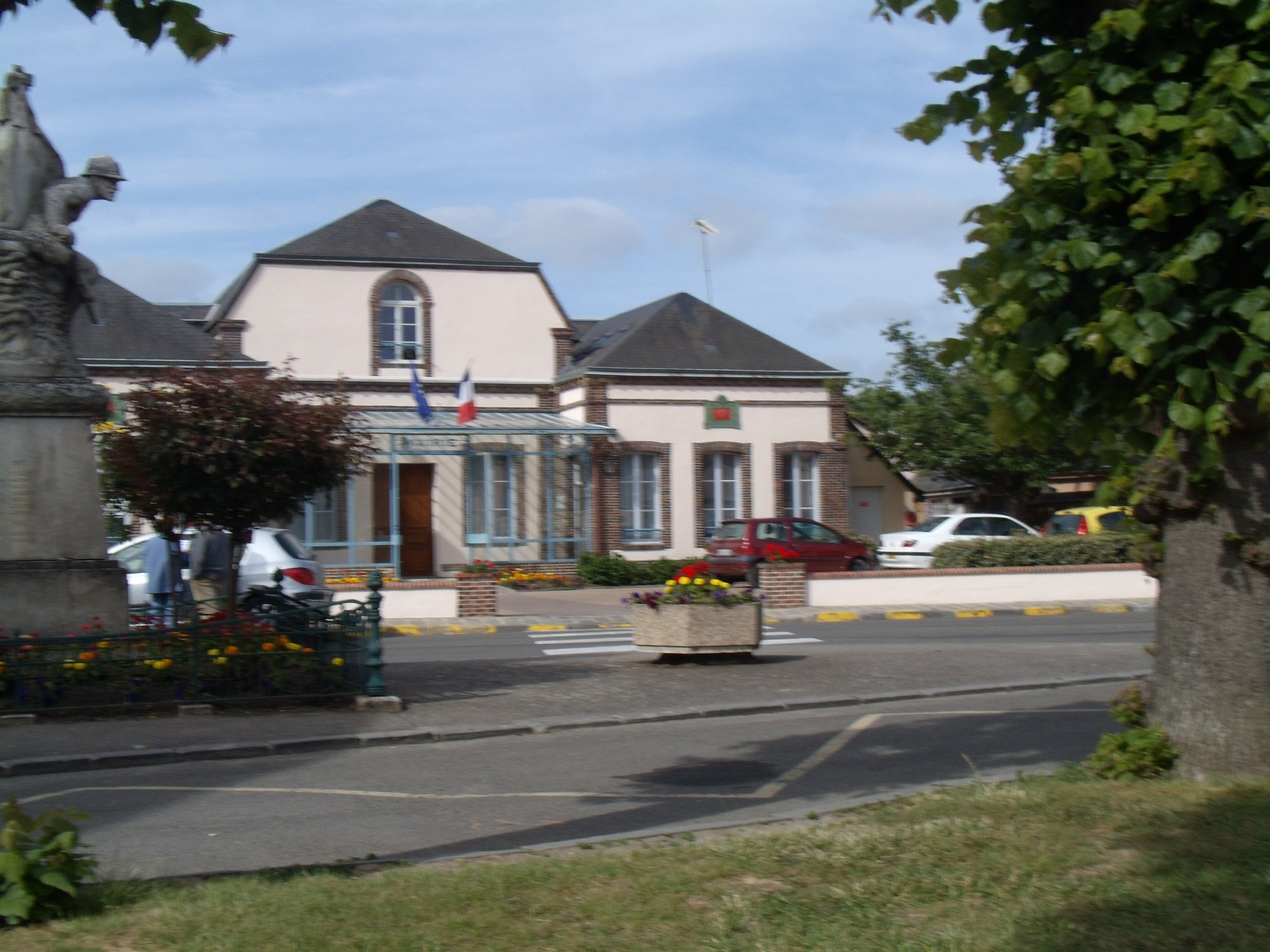 La mairie de Jouy (Eure-et-Loir)